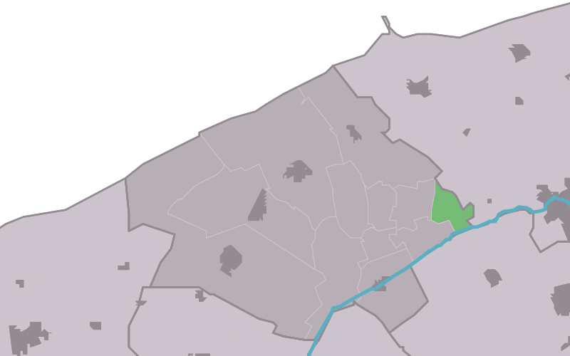 Kaartsje fan himrik fan Lichtaard